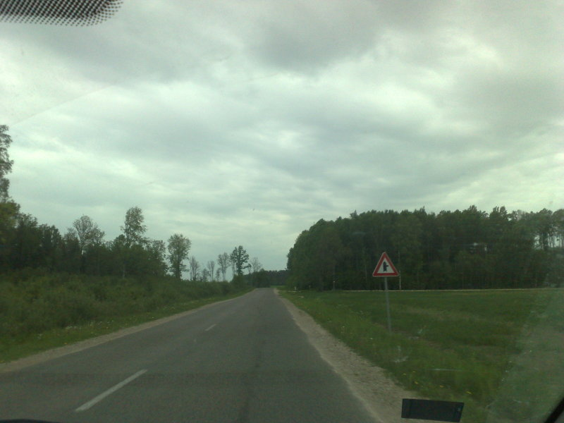 P104 near Jaunpils, Latvia